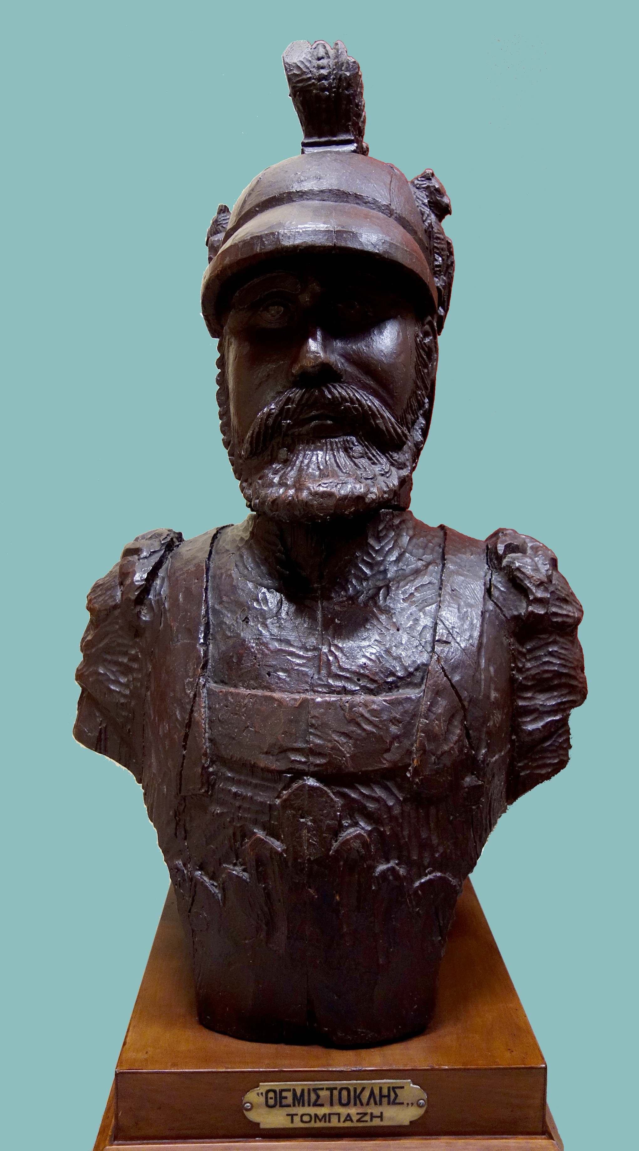 Mvskoke: Το ακρόπρωρο (διακοσμητικό άγαλμα σκαλισμένο στην άκρη της πλώρης) του πλοίου Θεμιστοκλής του Ναυάρχου Ιάκωβου Τομπάζη.